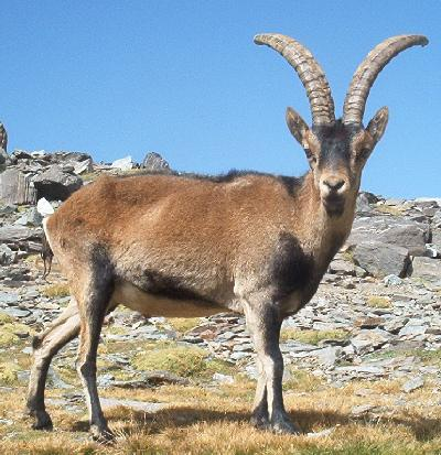 Author: José M. Gómez